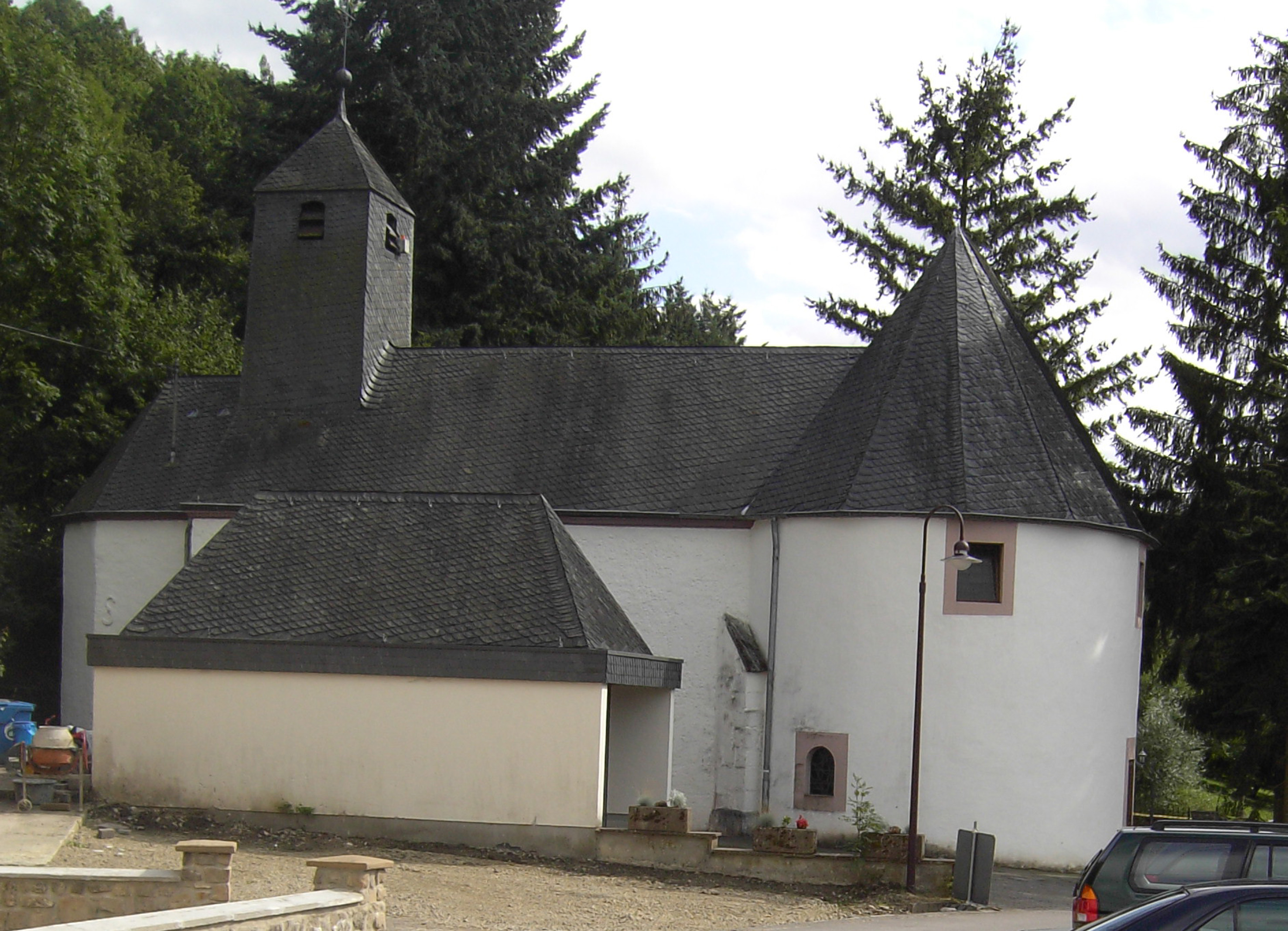 Prumzurlay - Church in Germany